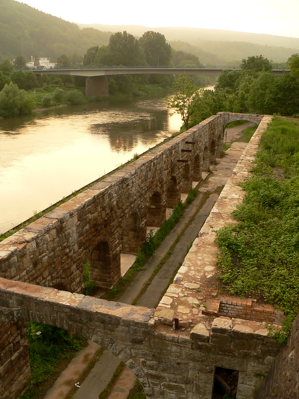 Weserumschlagstelle, Arkaden nach Bausicherung